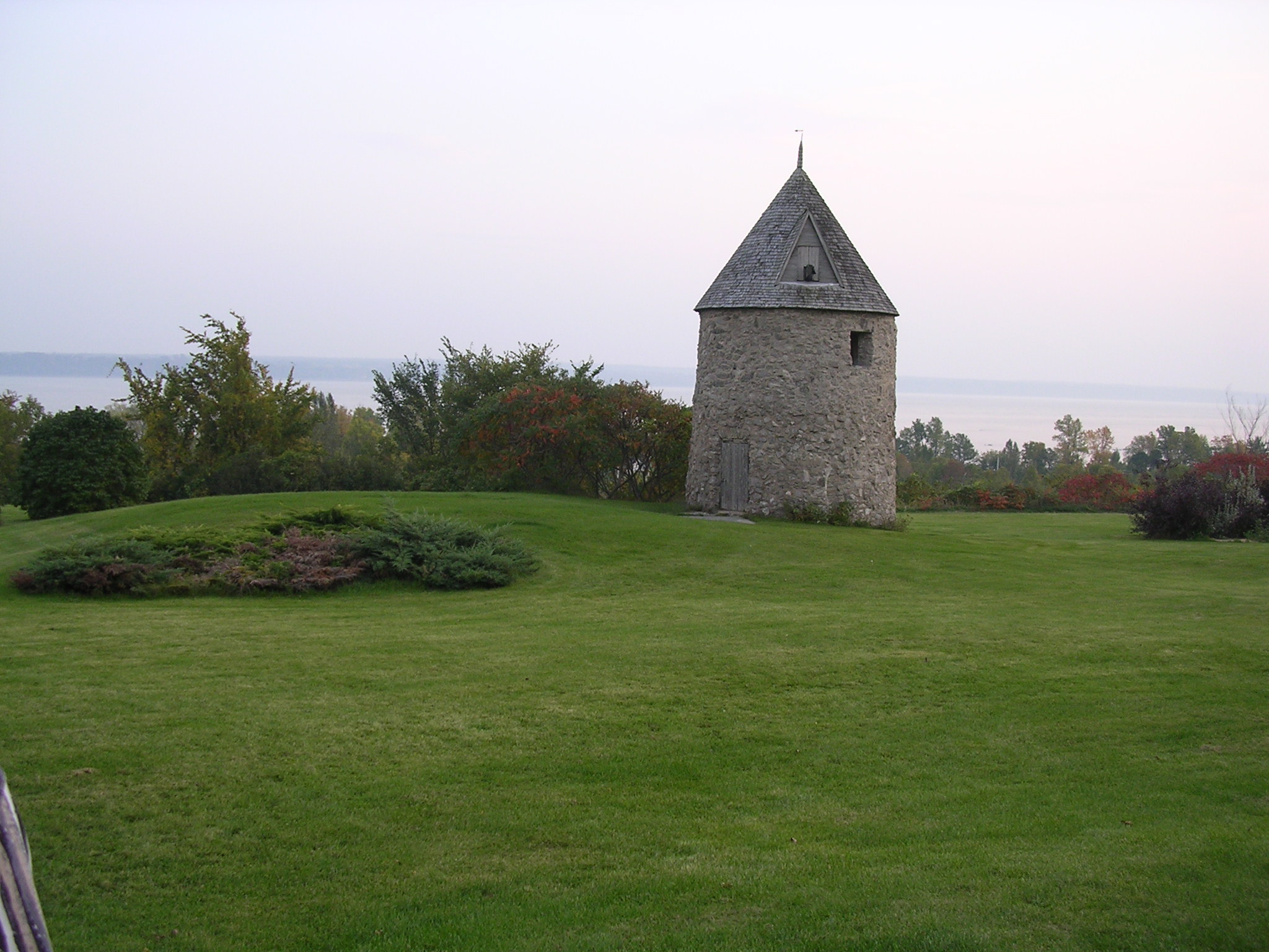 Moulin Voyer à Neuville (Québec). Il s'agit d'une reconstitution d'un moulin à vent inspiré du moulin à vent de l'Île-aux-Coudres. Le nom Voyer est celui de ses constructeurs.